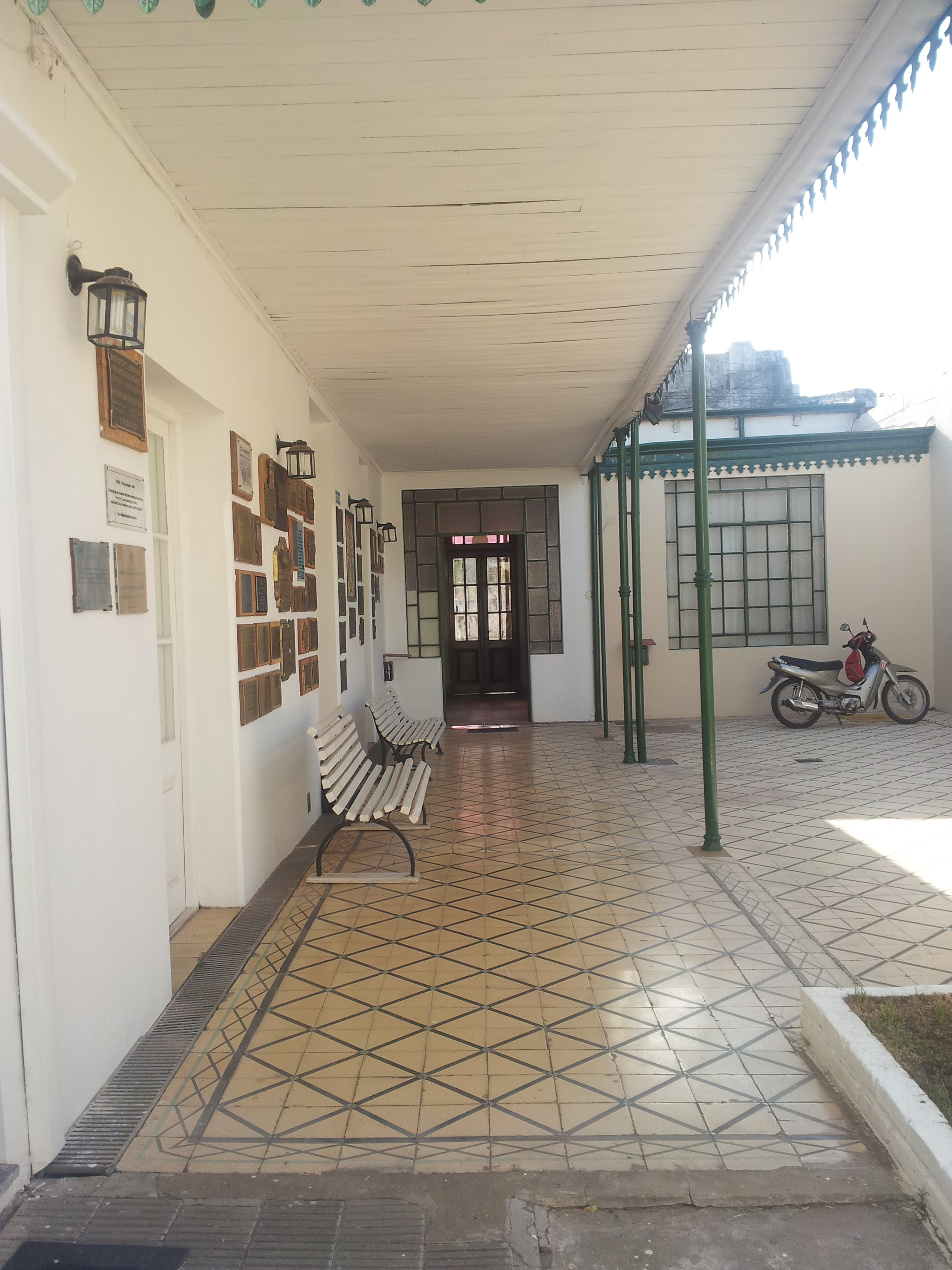 Patio de la casa natal de Juan Domingo Perón, en la ciudad de Lobos, provincia de Buenos Aires